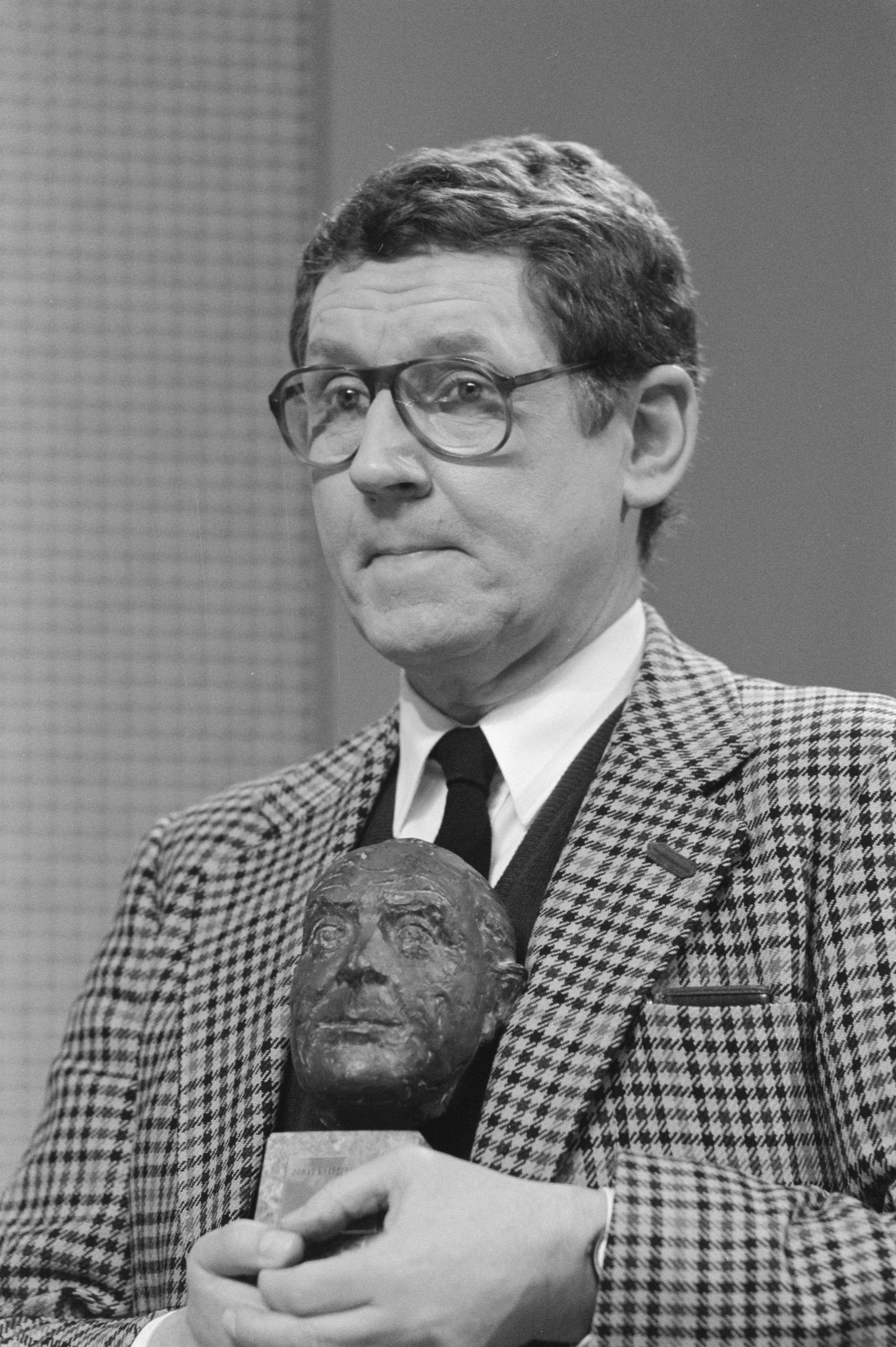 Collectie / Archief : Fotocollectie Anefo Reportage / Serie : [ onbekend ] Beschrijving : Johan Kaartprijs uitgereikt aan John Lantink in Amsterdam; John Lantink met de prijs, koppen Datum : 9 februari 1988 Locatie : Amsterdam, Noord-Holland Trefwoorden : prijzen, uitreikingen Persoonsnaam : John Lantink Fotograaf : Croes, Rob C. / Anefo Auteursrechthebbende : Nationaal Archief Materiaalsoort : Negatief (zwart/wit) Nummer archiefinventaris : bekijk toegang 2.24.01.05 Bestanddeelnummer : 934-1864